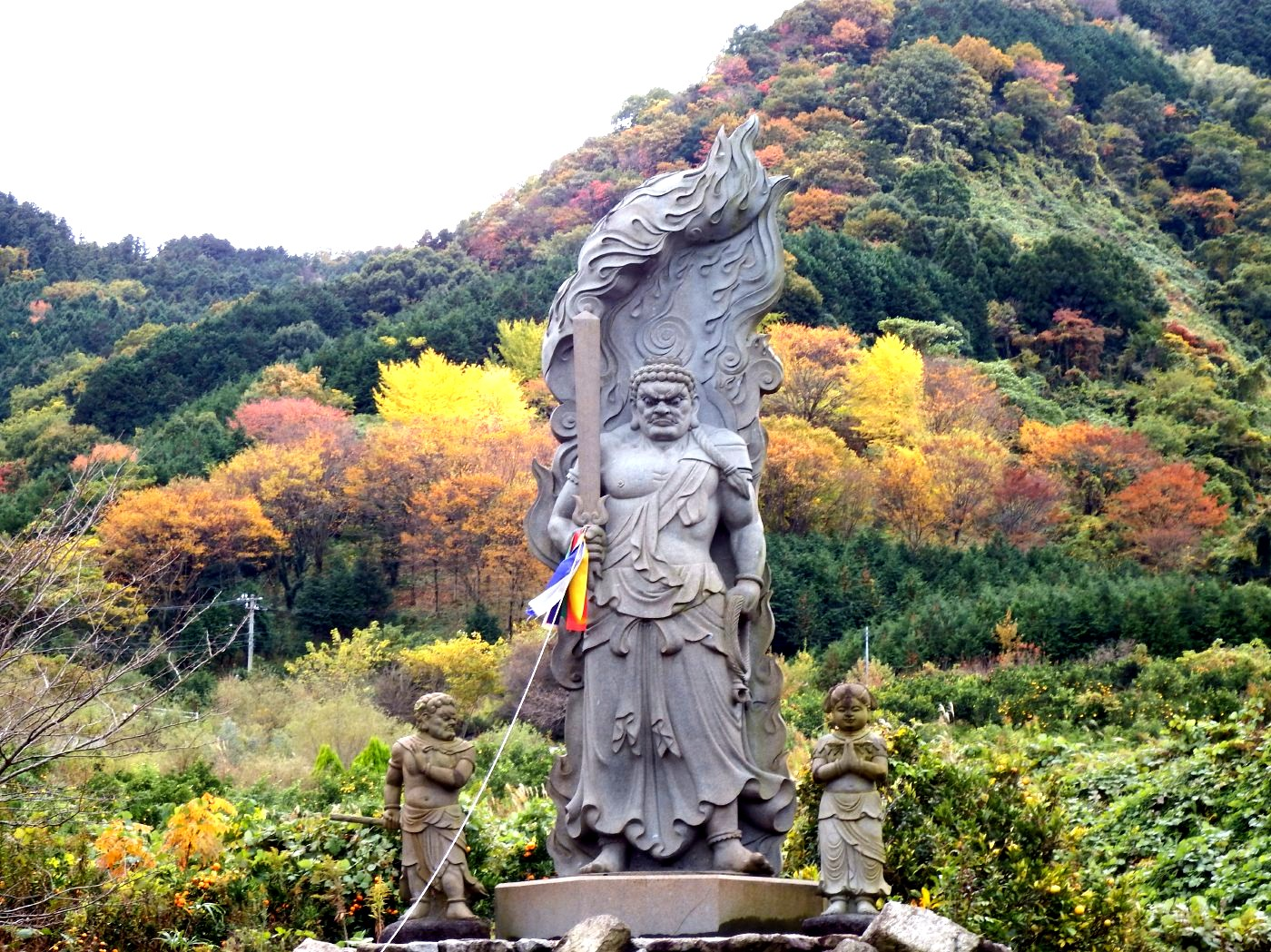 八坂寺のいやさか不動